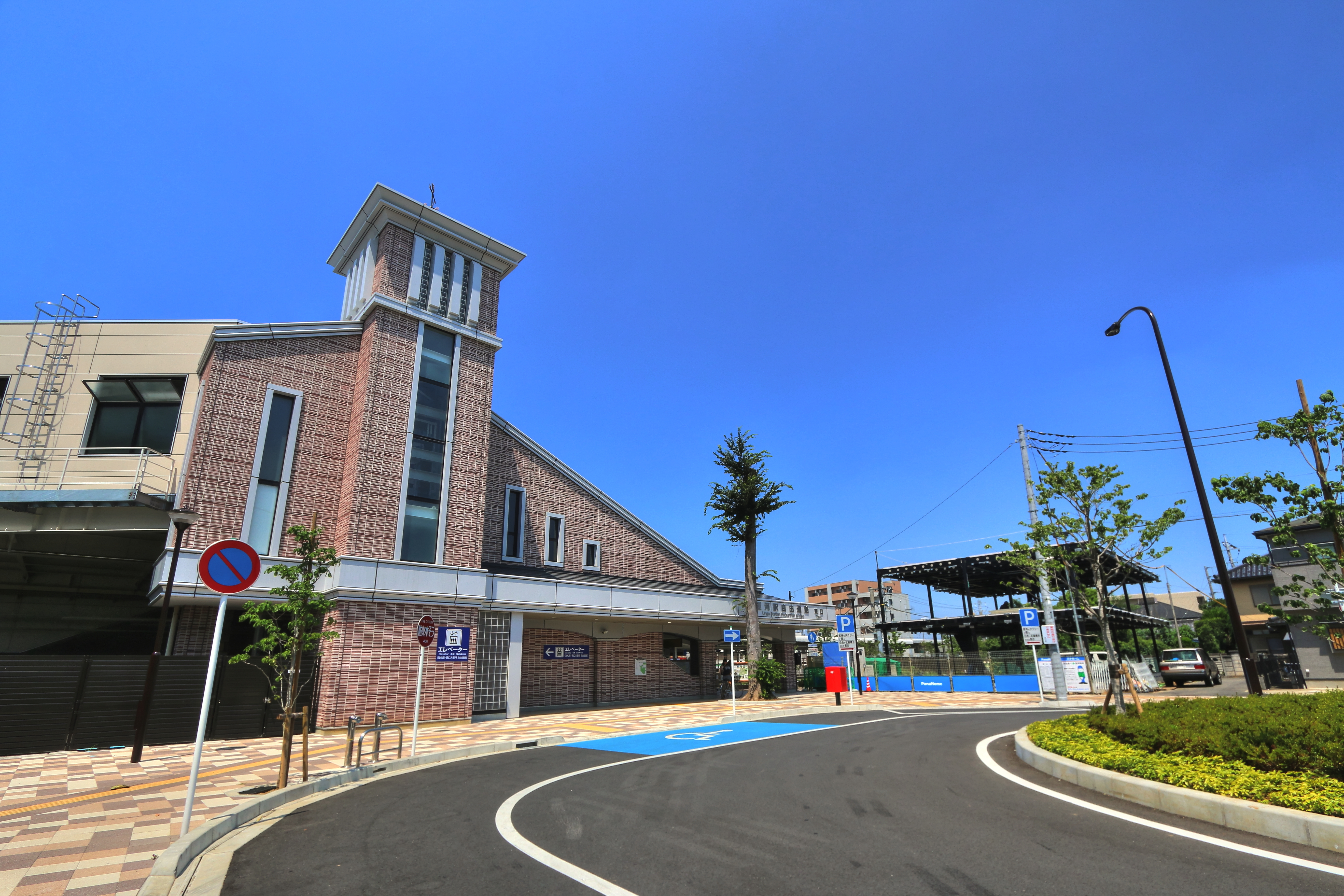 運河駅